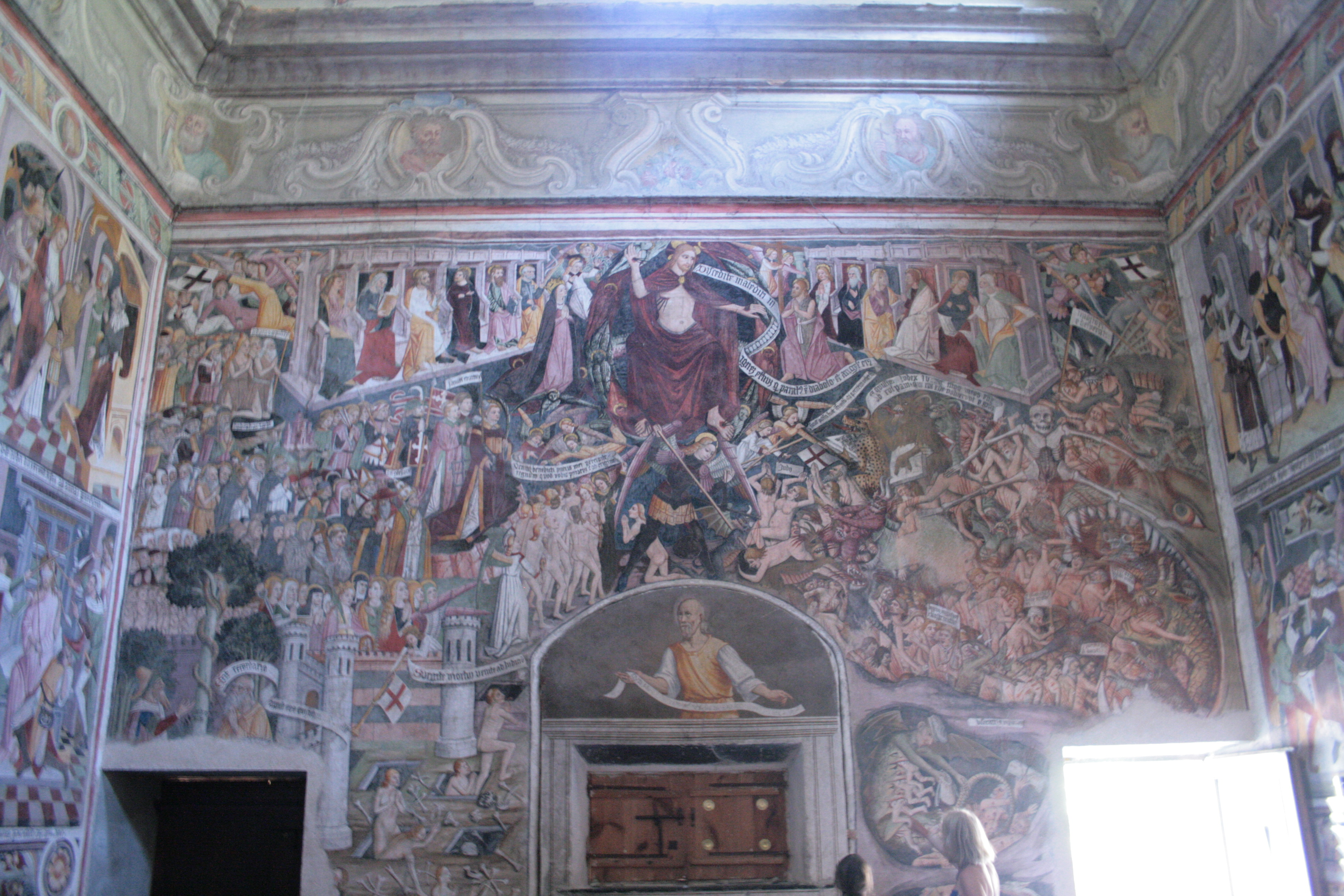 Notre-Dame-des-Fontaines, Alpes-Maritimes, France, Jean Canavesio, Le Jugement dernier